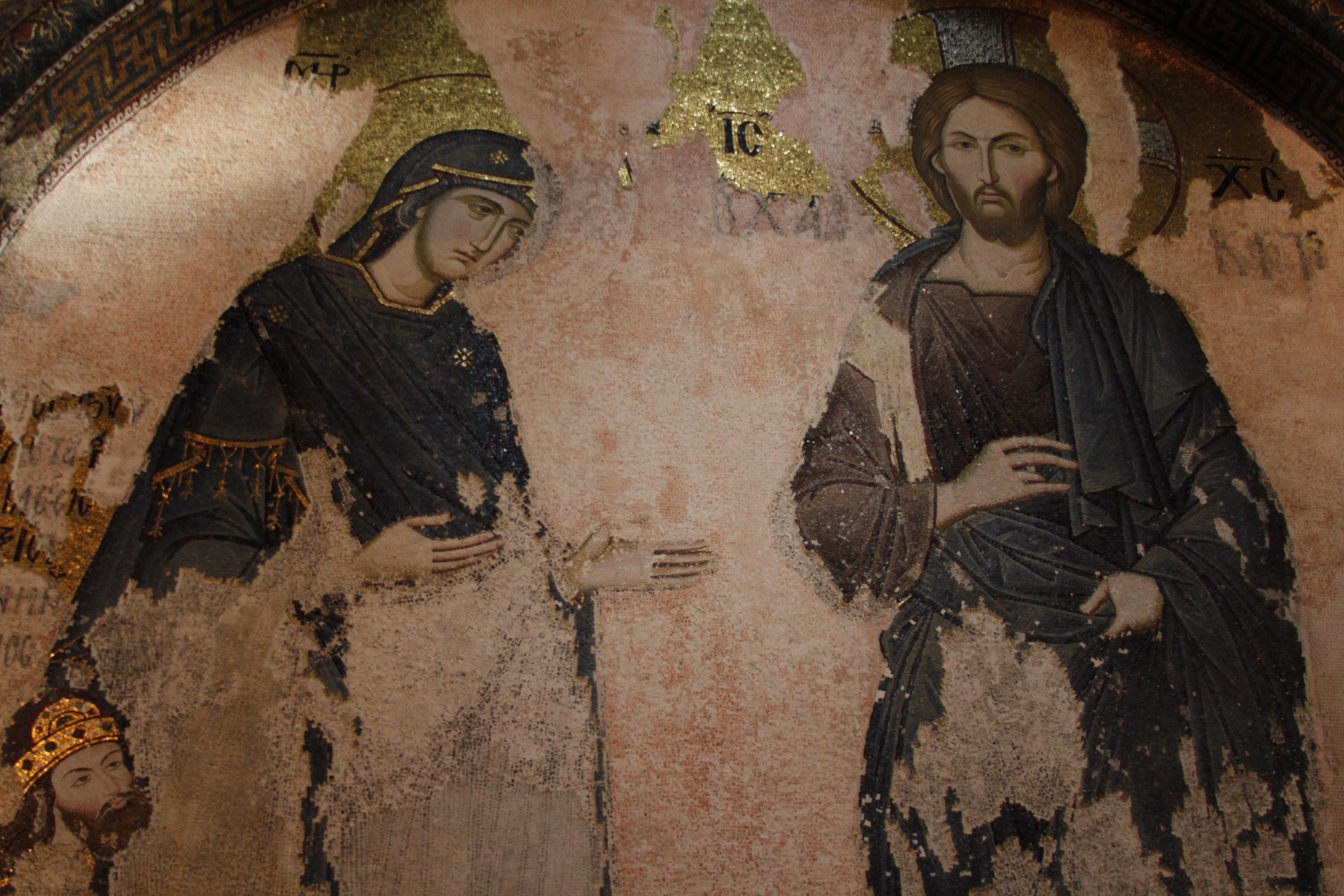 Mosaico Deesis ("Súplica") em Chora